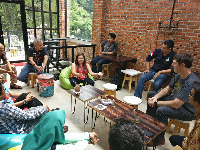 Meeting with open source community members in Indonesia